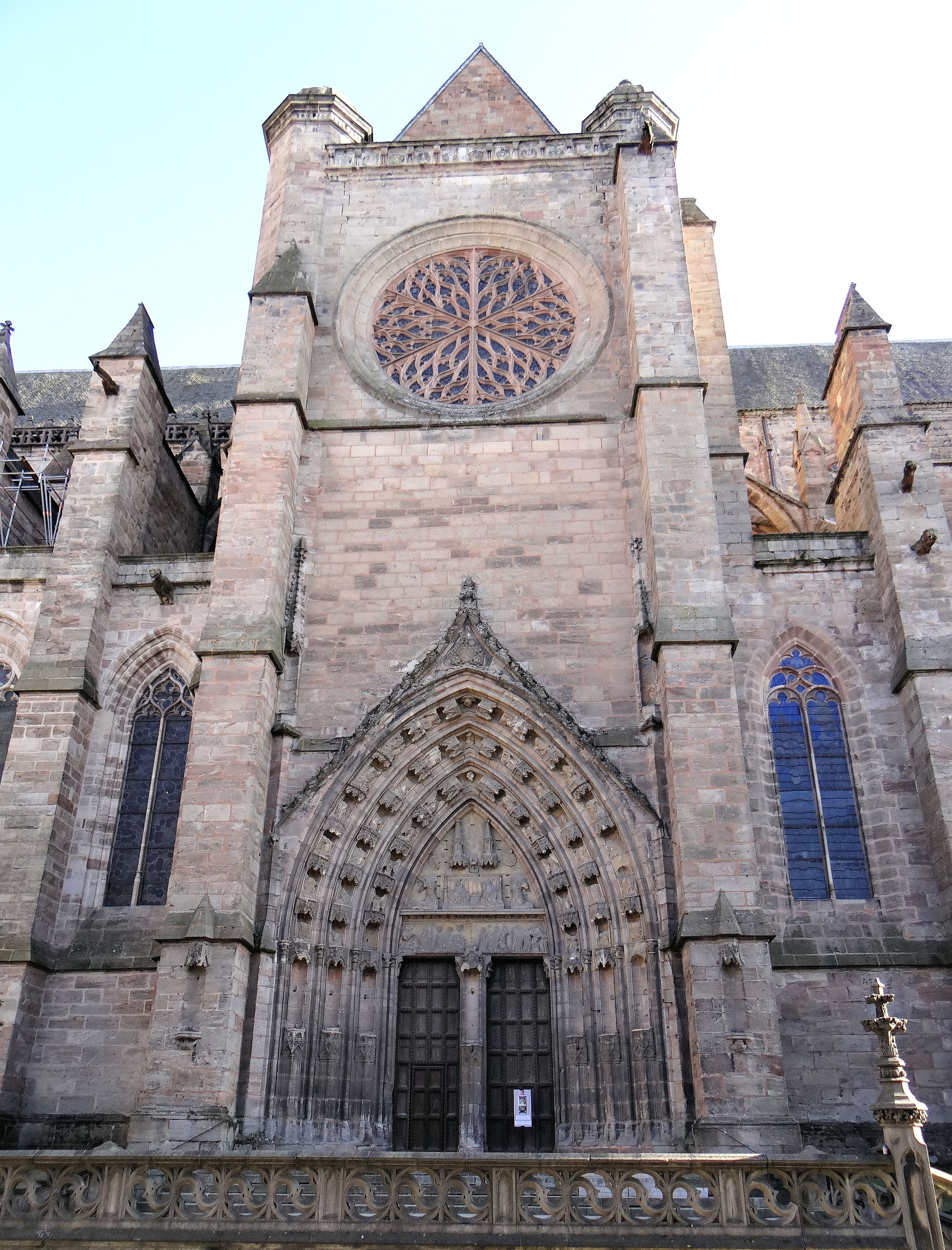 Rodez - Cathédrale Notre-Dame - Façade du bras nord du transept